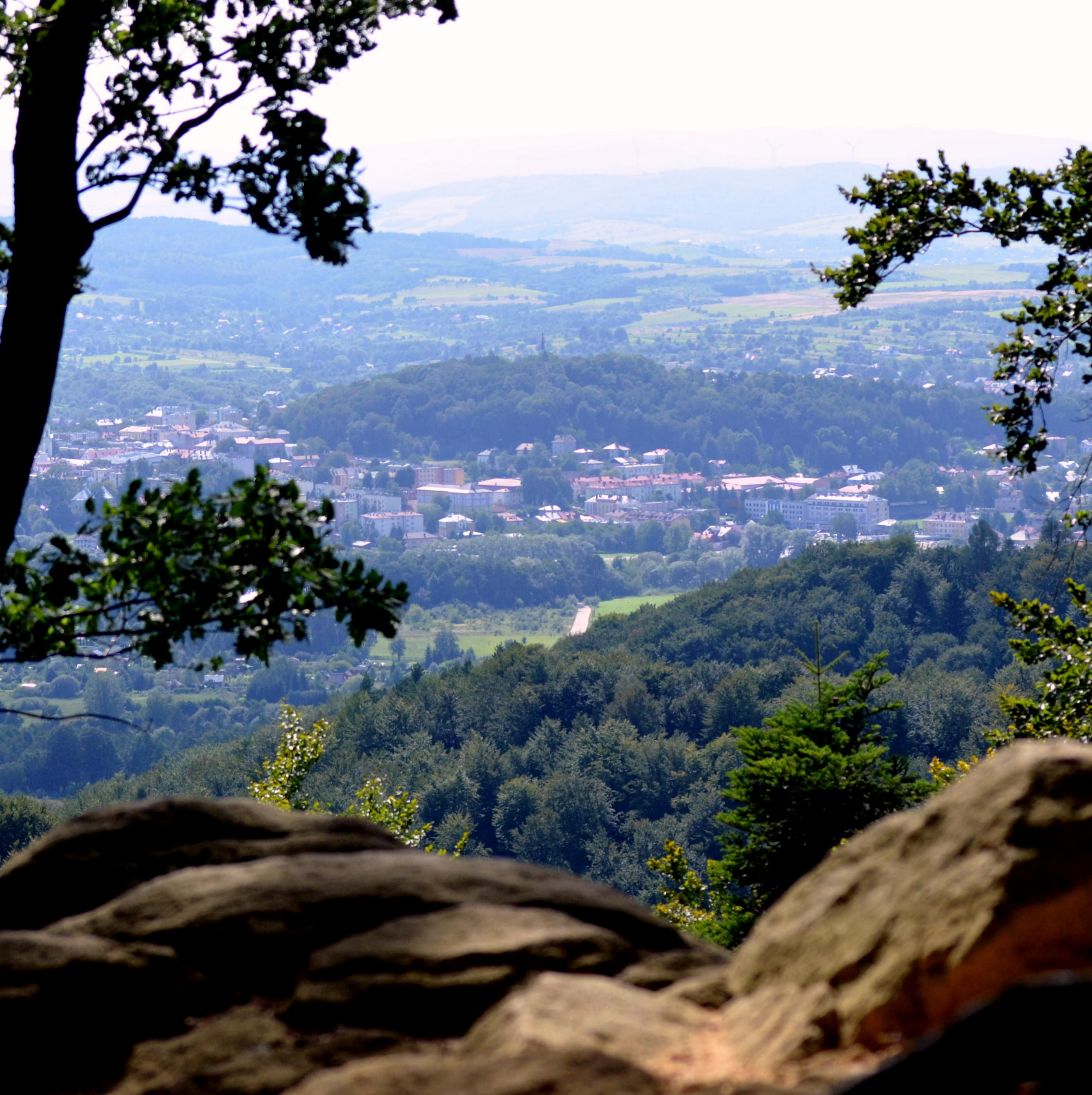 Adlerfels im Salzgebierge